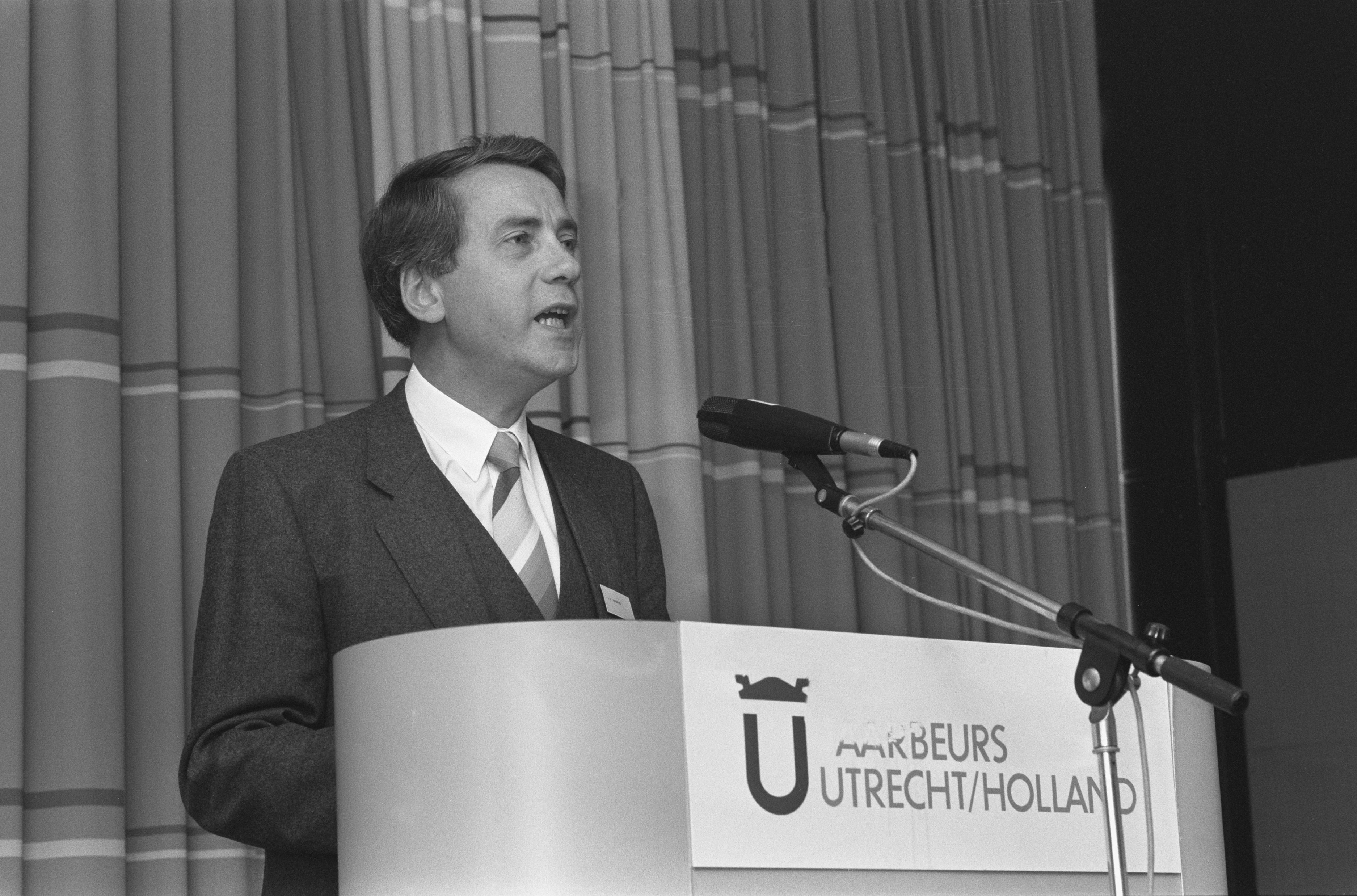 Collectie / Archief : Fotocollectie Anefo Reportage / Serie : [ onbekend ] Beschrijving : Congres Onderwijsrecht in Utrecht; v.l.n.r. prof. Koekoek drs. De Haan en Prof. Drop + opdracht Stichting Bijzondere Leerstoel Onderwijsrecht / Datum : 30 september 1987 Locatie : Utrecht Trefwoorden : congressen Persoonsnaam : Drs. de H. Prof. Koekoek Instellingsnaam : Stichting Bijzondere Leerstoel Onderwijsrecht Fotograaf : Croes, Rob C. / Anefo Auteursrechthebbende : Nationaal Archief Materiaalsoort : Negatief (zwart/wit) Nummer archiefinventaris : bekijk toegang 2.24.01.05 Bestanddeelnummer : 934-0891